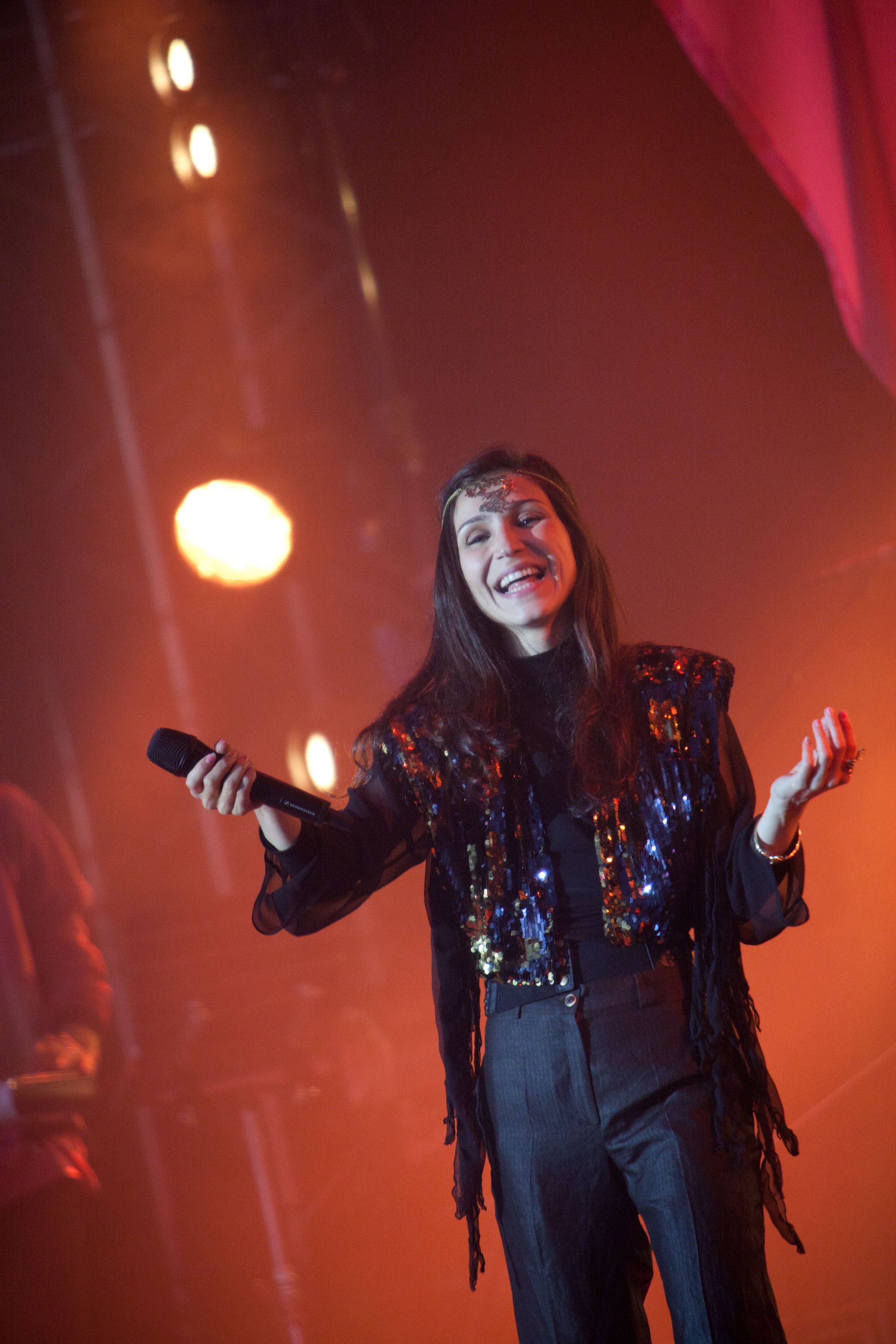 Laleh, Peace & Love-festivalen 29 juni 2012.